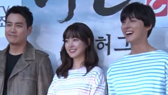 2018년 5월 9일 광화문역 6번출구에서 시청률 공약 '프리허그' 행사가 진행되었으며 주상욱, 진세연, 윤시윤이 참석했다.